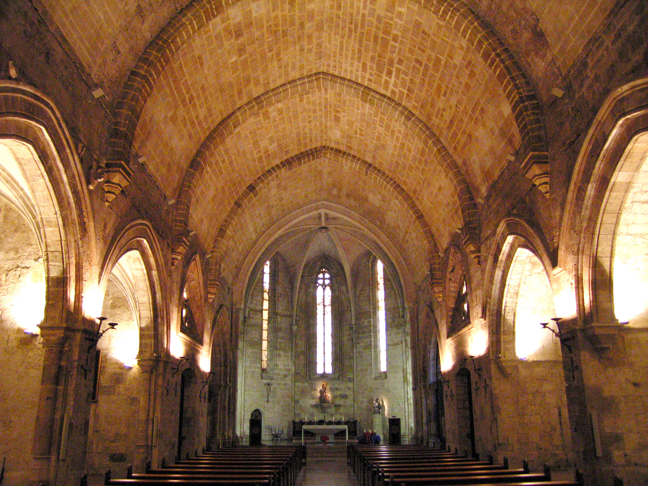 Sant Joan de l'Hospital (València). Nau